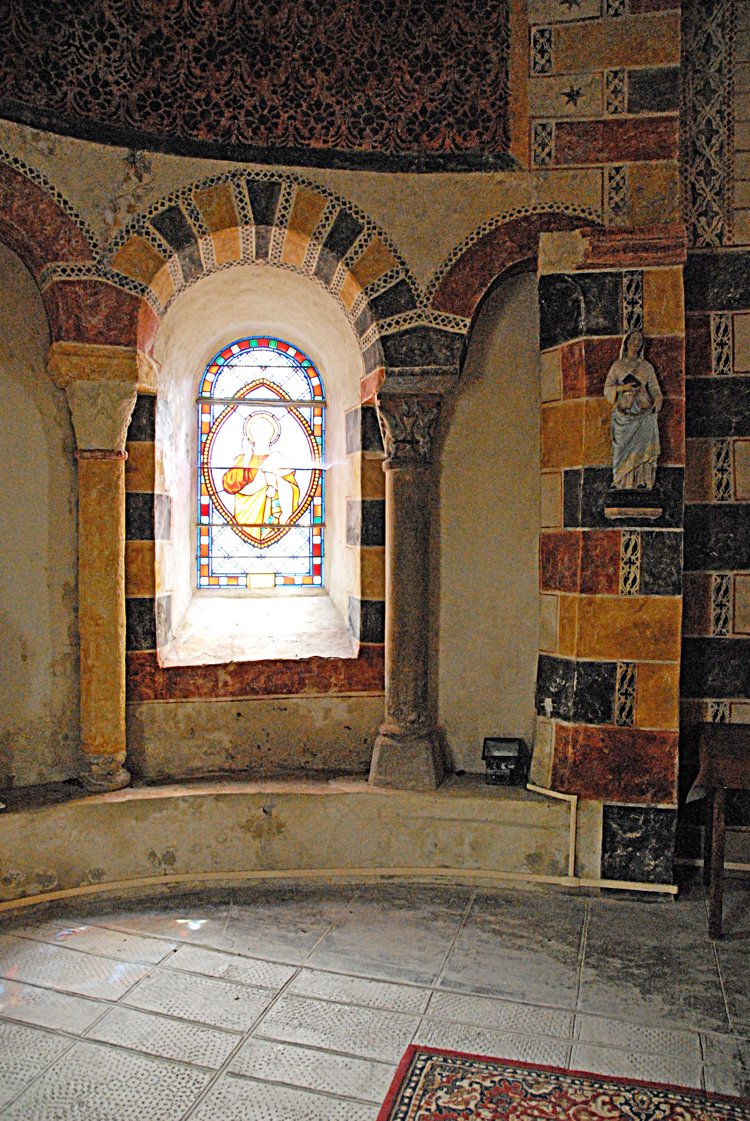 Dorfkirche Chambon-sur-Lac, Arkaden Chorapsis, links außen